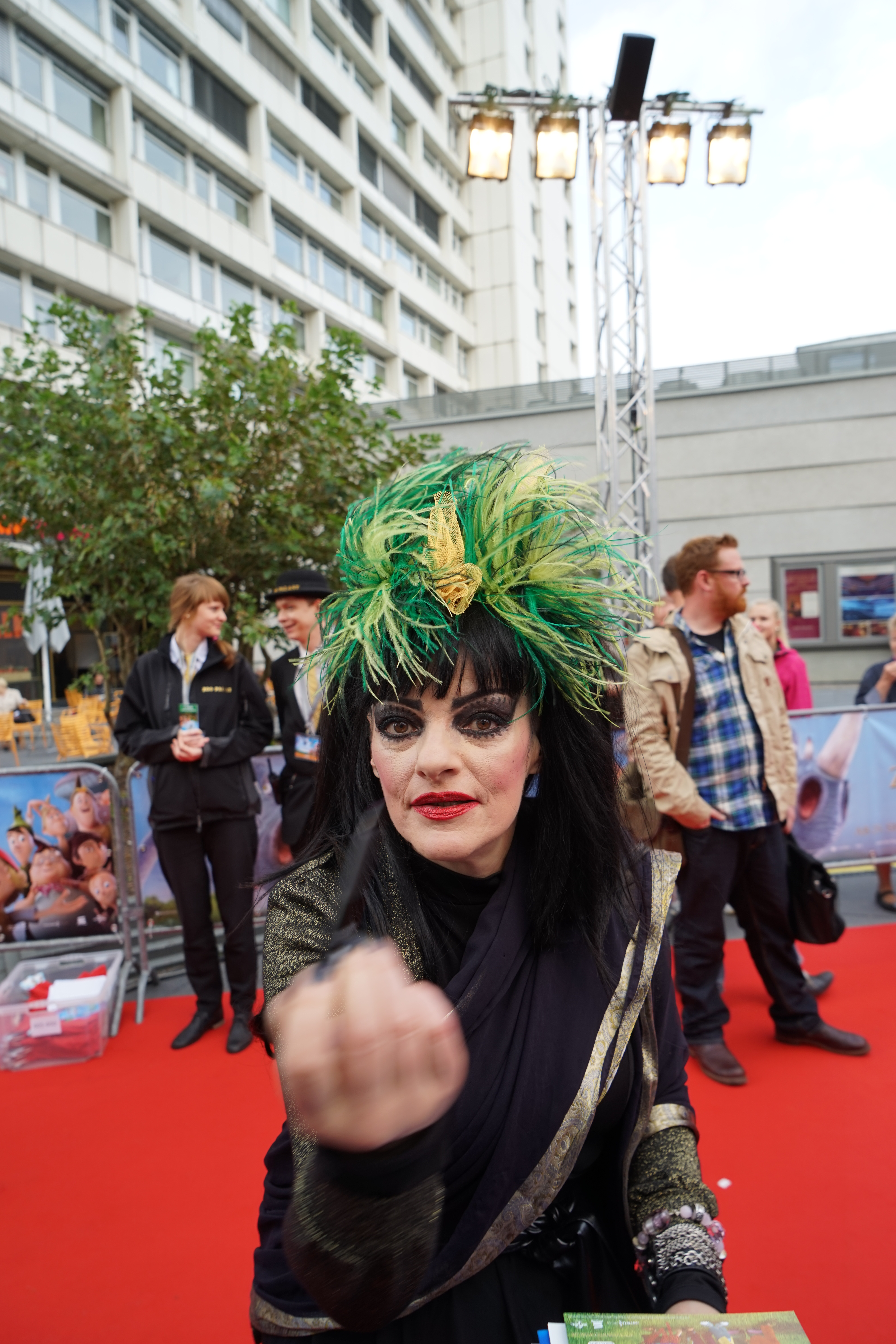 Nina Hagen auf der Premiere des Films "Der Siebte Zwerg" am 21. September 2014